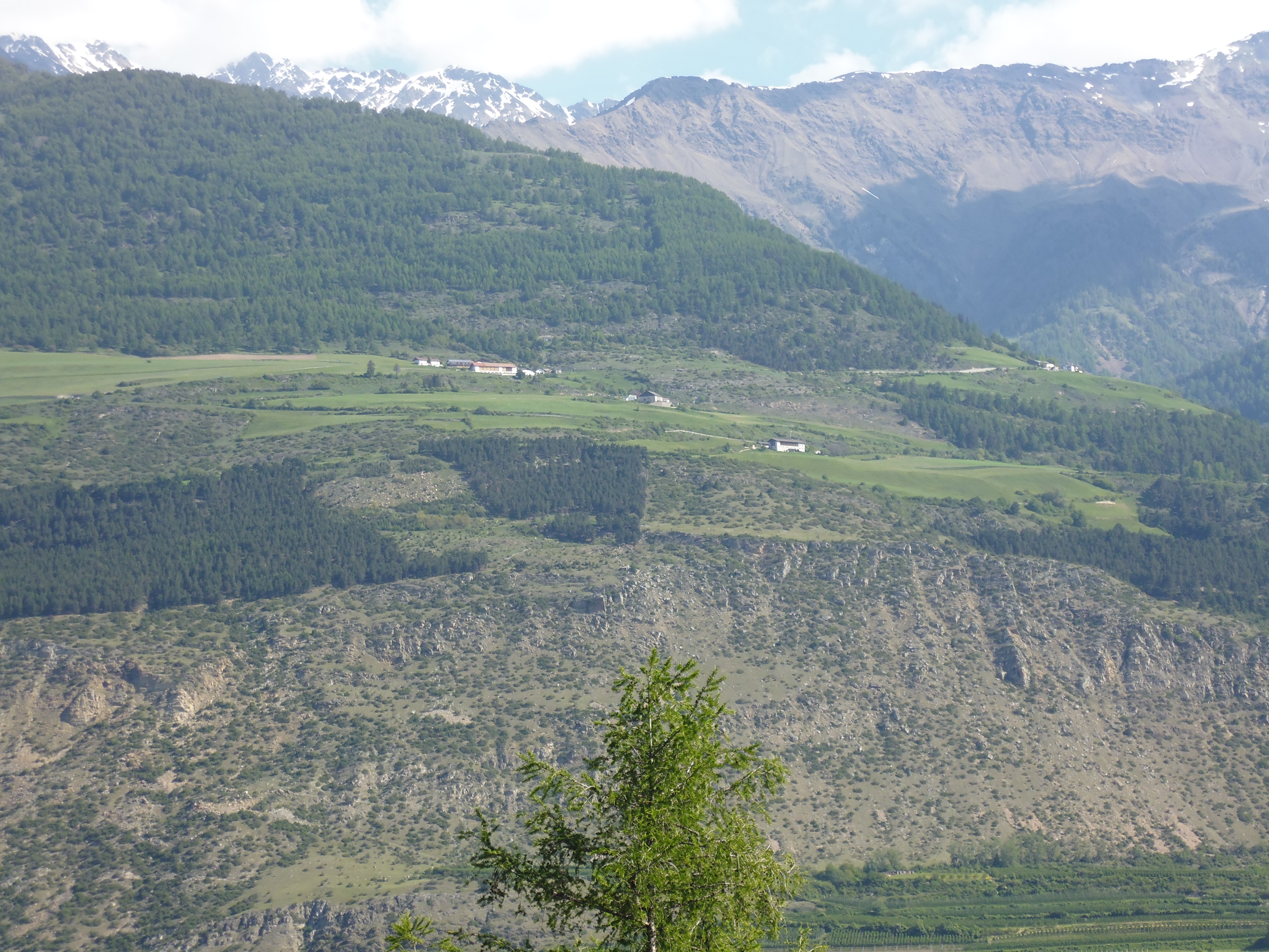 Tröghöfe über Allitz bei Laas in Südtirol